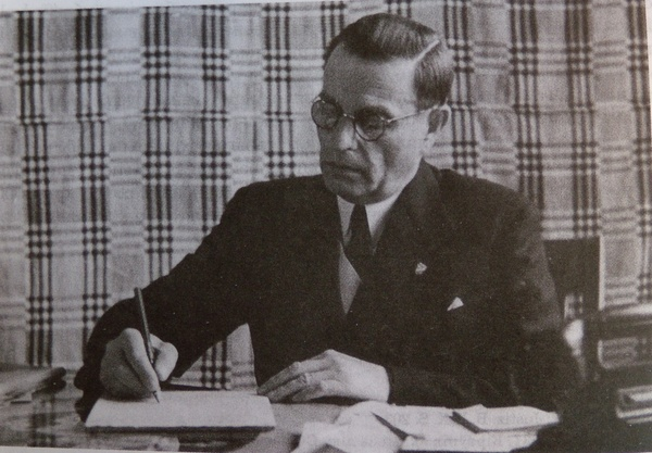 Беларуская (тарашкевіца): Радаслаў Астроўскі (Radasłaŭ Astroŭski)